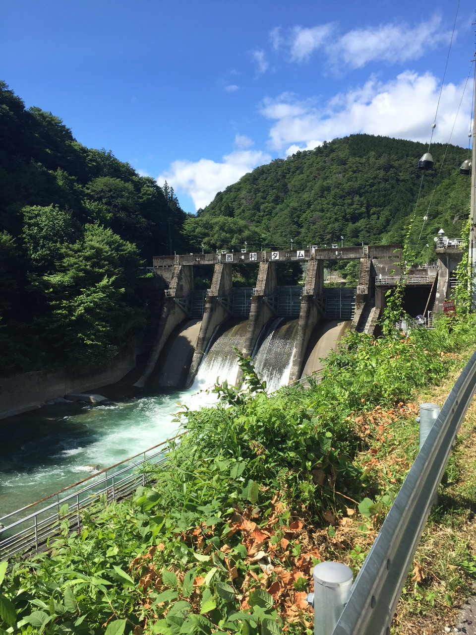 西村ダム(岐阜県下呂市)